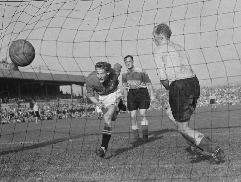 Zwitserland tegen Nederland 7-5 tweede Zwitsers doelpunt (=Charles Antenen)